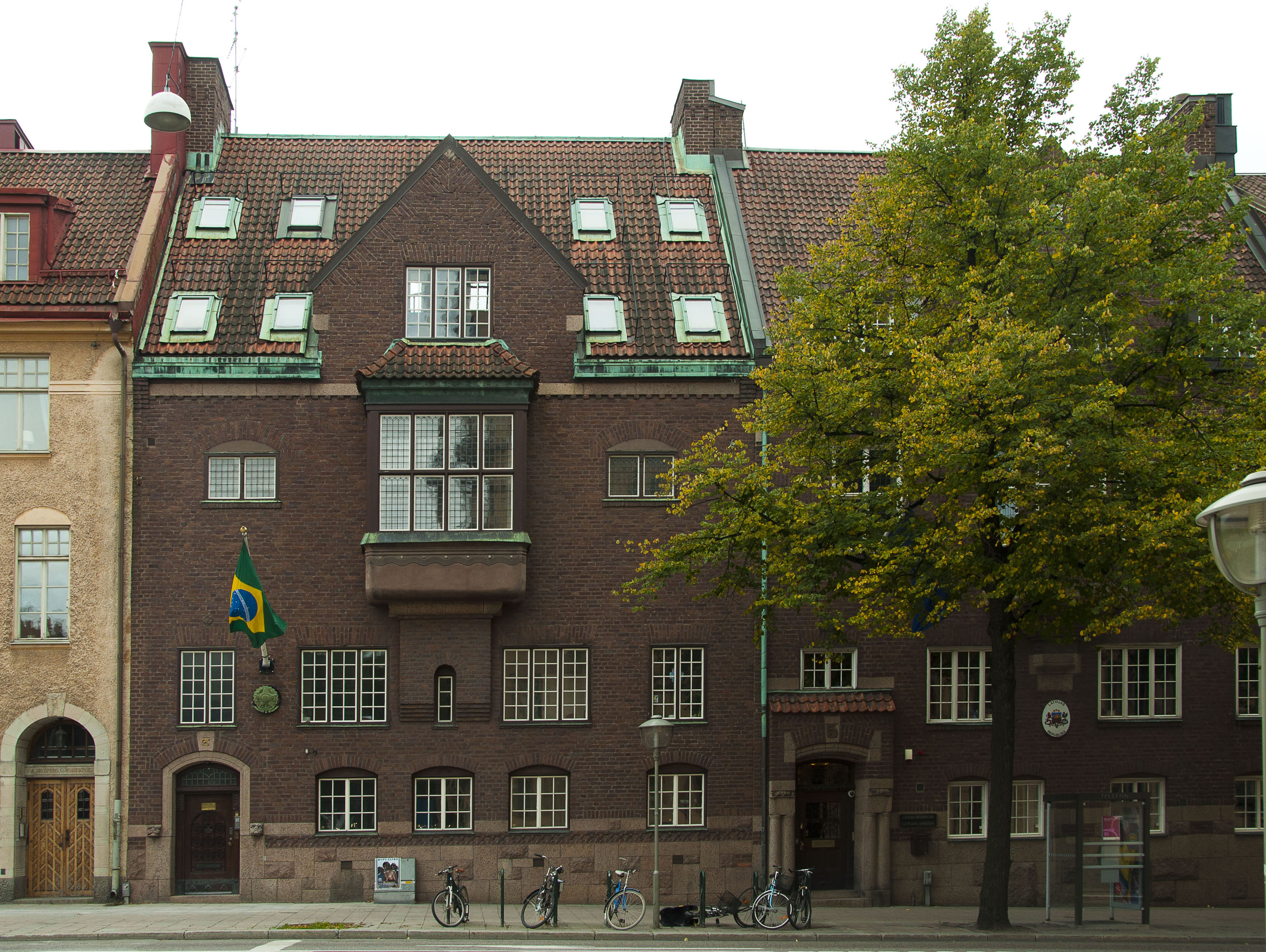 Odengatan 3 (Tofslärkan 7): Byggnadsår 1909-10, arkitekt och byggherre Folke Zettervall, byggmästare F Dahl. Till höger om föregående byggnad skymtar Odengatan 5 (Tofslärkan 6) Byggnadsår 1912-14, arkitekt Folke Zettervall, byggherre och byggmästare R Edblom. Byggnaden fungerar numera som Lettlands ambassad i Stockholm.